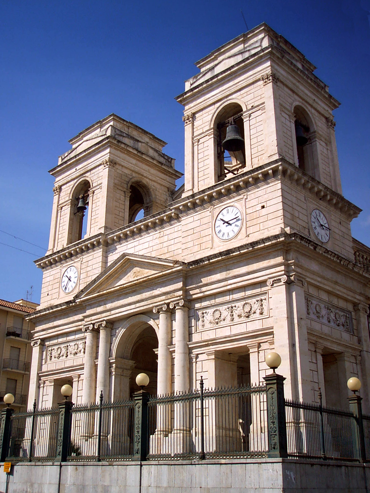 Piazza Duomo (Duomo Place), Giarre, Sicily, Italy; 2007